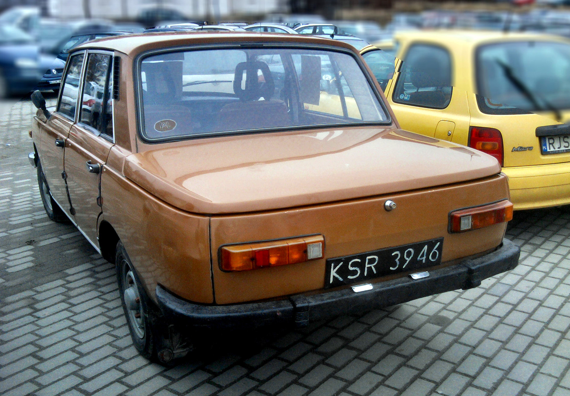 Brązowy Wartburg 353 z 1983 roku. Jasło, Polska.